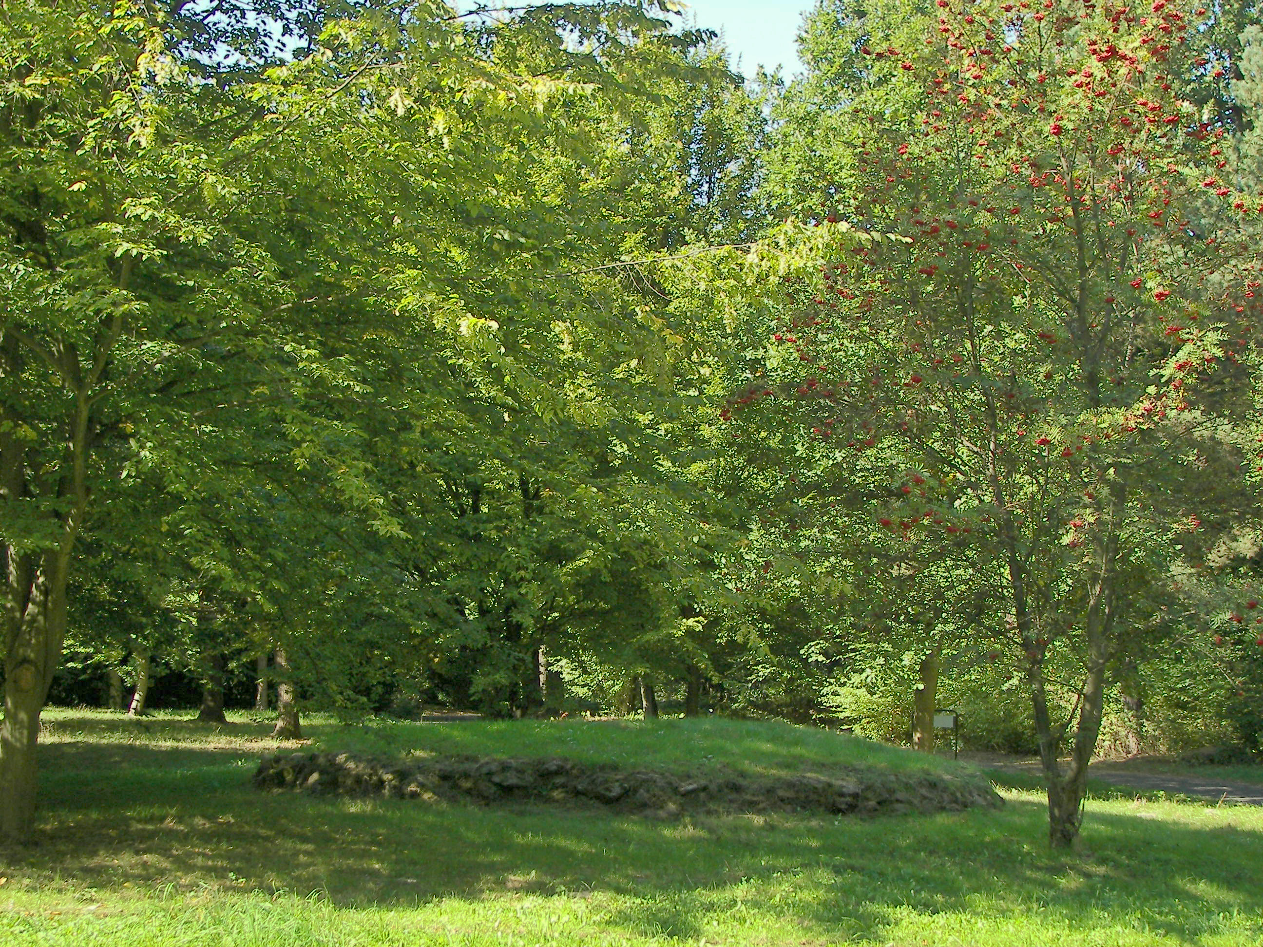 Hügelgrab im Botanischen Garten auf den Lahnbergen (Marburg)